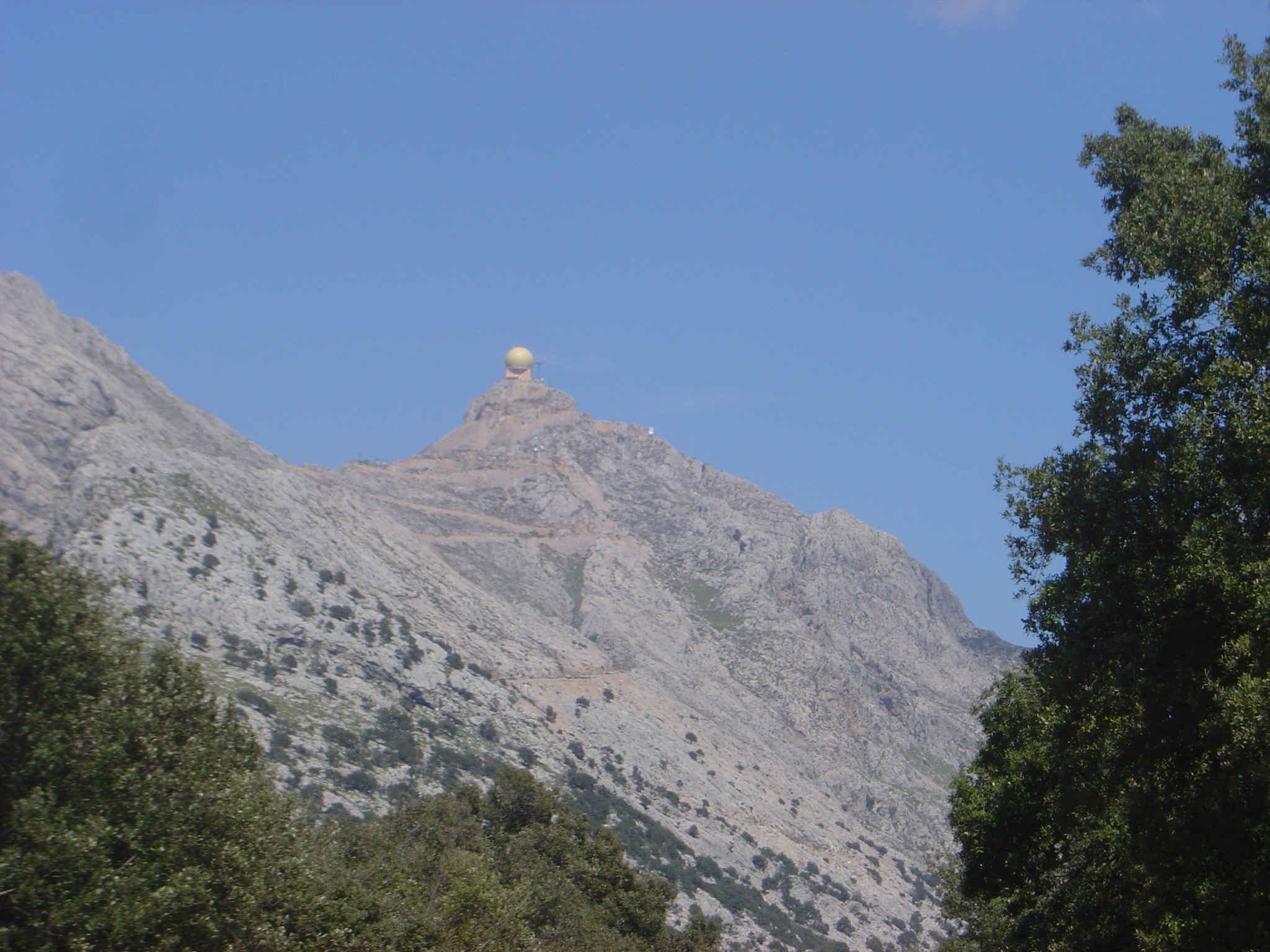 El Puig Major. Escorca. Mallorca.